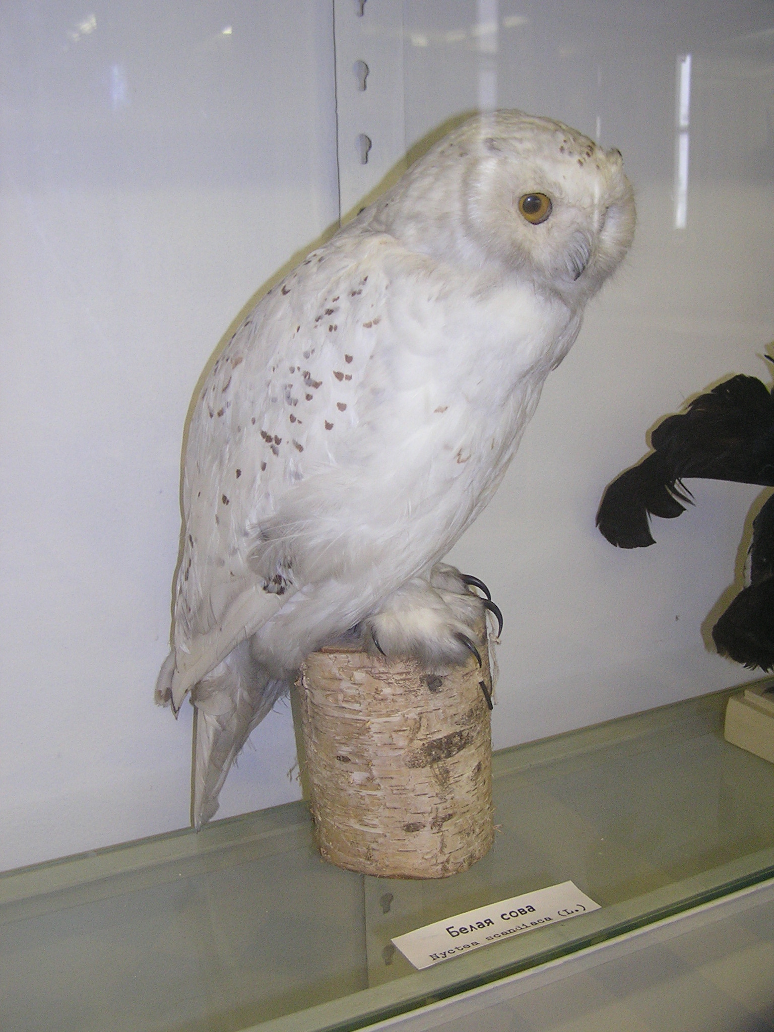 Зоологический музей в Санкт-Петербурге. Белая сова